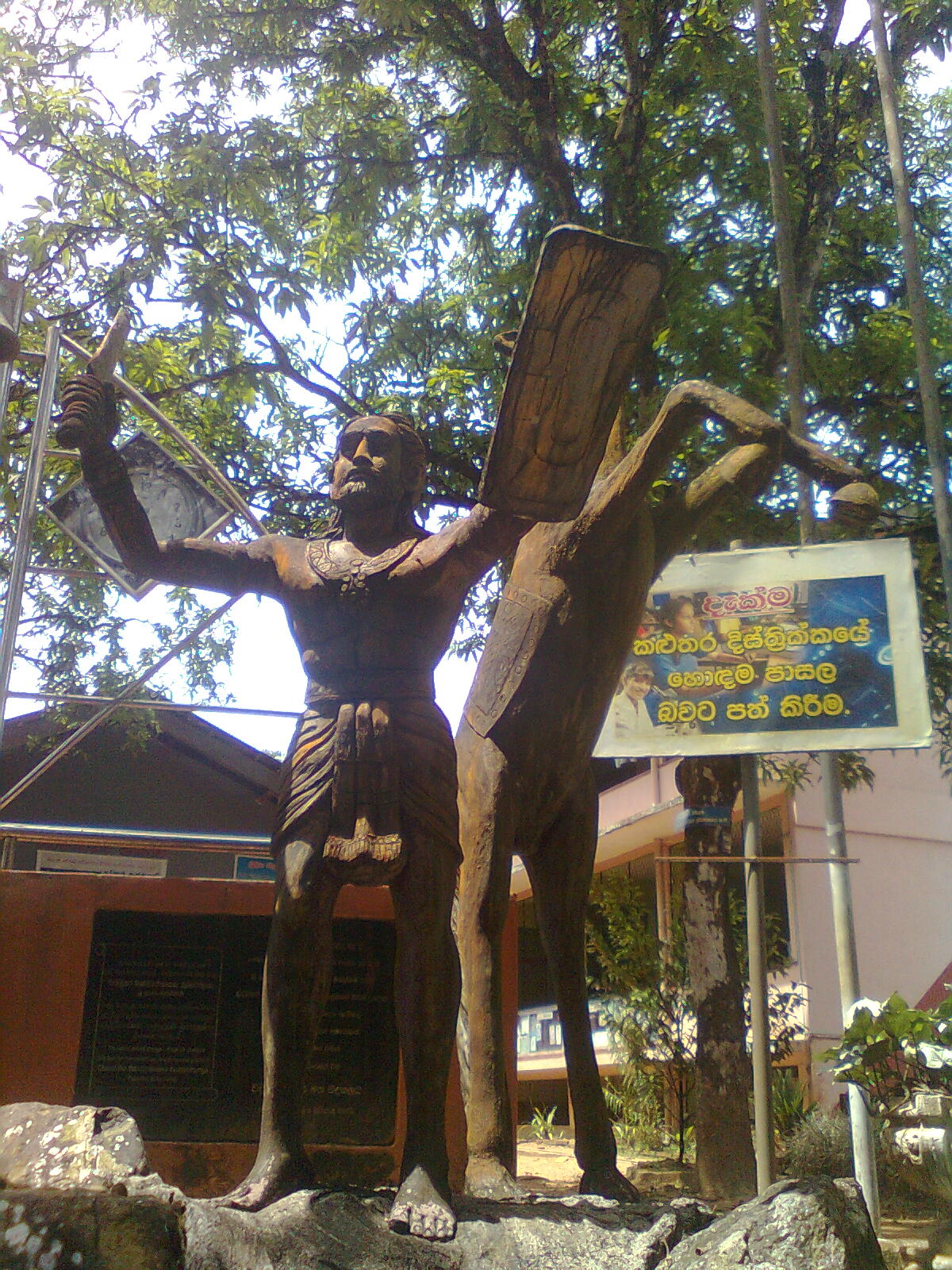 සිංහල: පාසලේ අැති වීදිය බණ්ඩාරගේ පිළිරුව